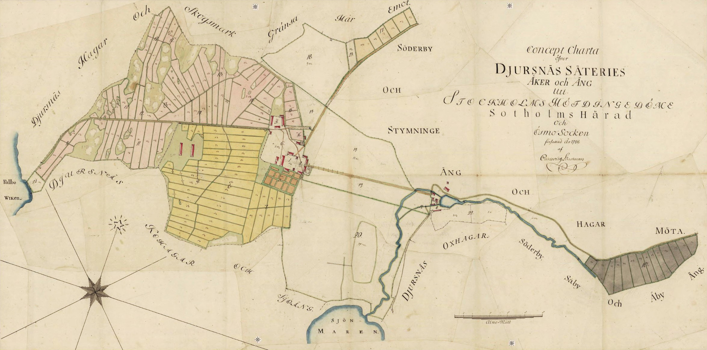 Concept charta öfver Djursnäs säteries åker och äng